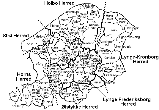 Fredriksborg Amt before 1970, Denmark.